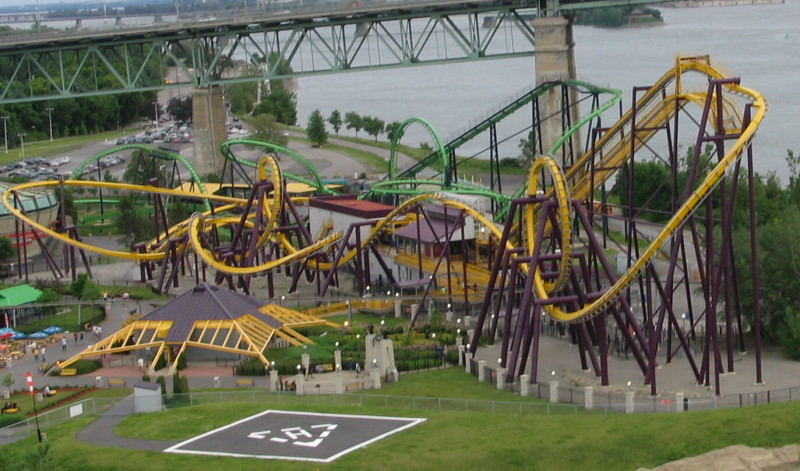 Photo:Eric Levasseur 6/7/2006 [1]